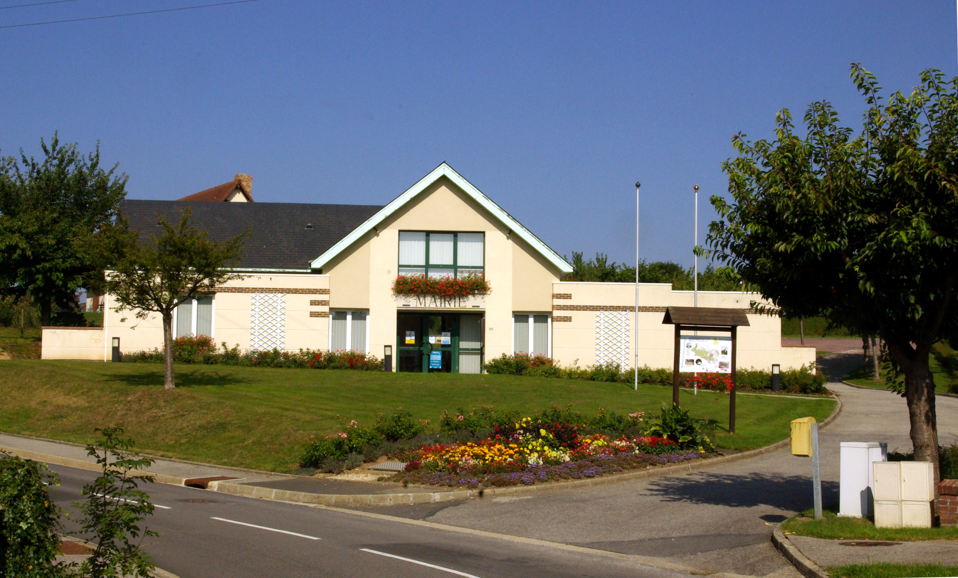 Mairie de Maulévrier-Sainte-Gertrude